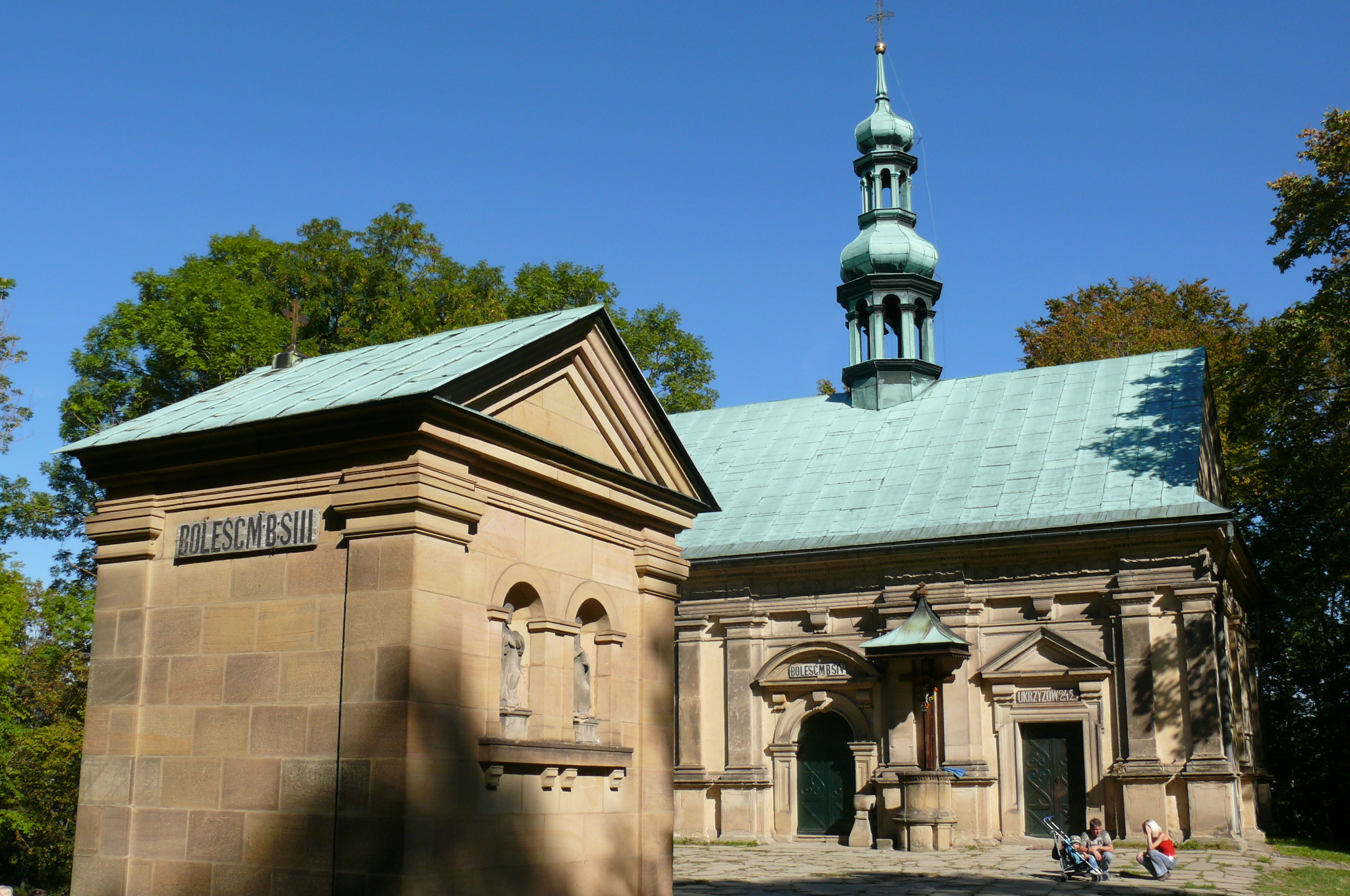 Sanktuarium pasyjno-maryjne w Kalwarii Zebrzydowskiej - Kaplica Ukrzyżowania.